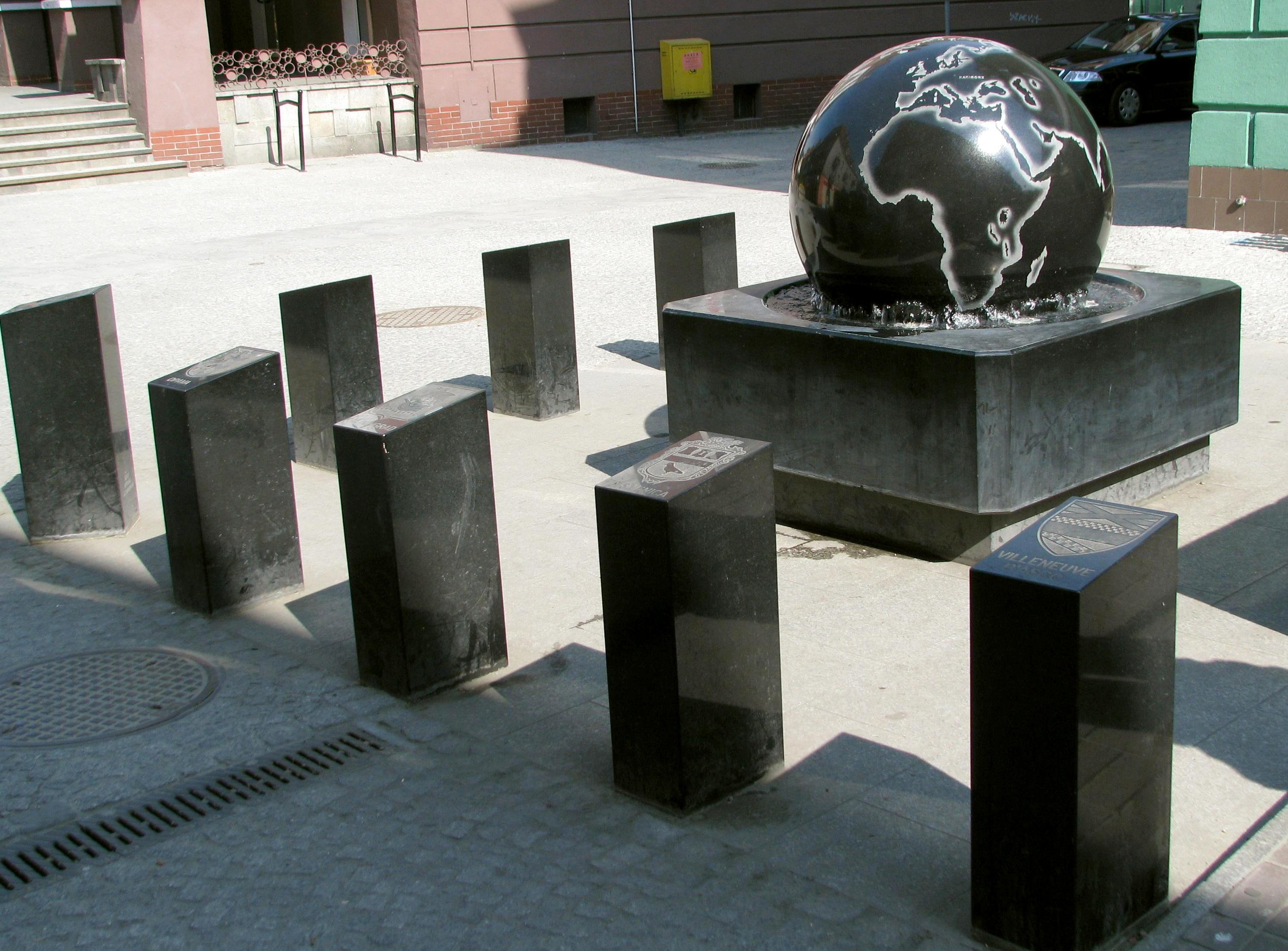 Denkmal der Partnerstädte in Ratibor (Racibórz) Fotorafiert 2009 in Ratibor, Straße (ul. Długa)